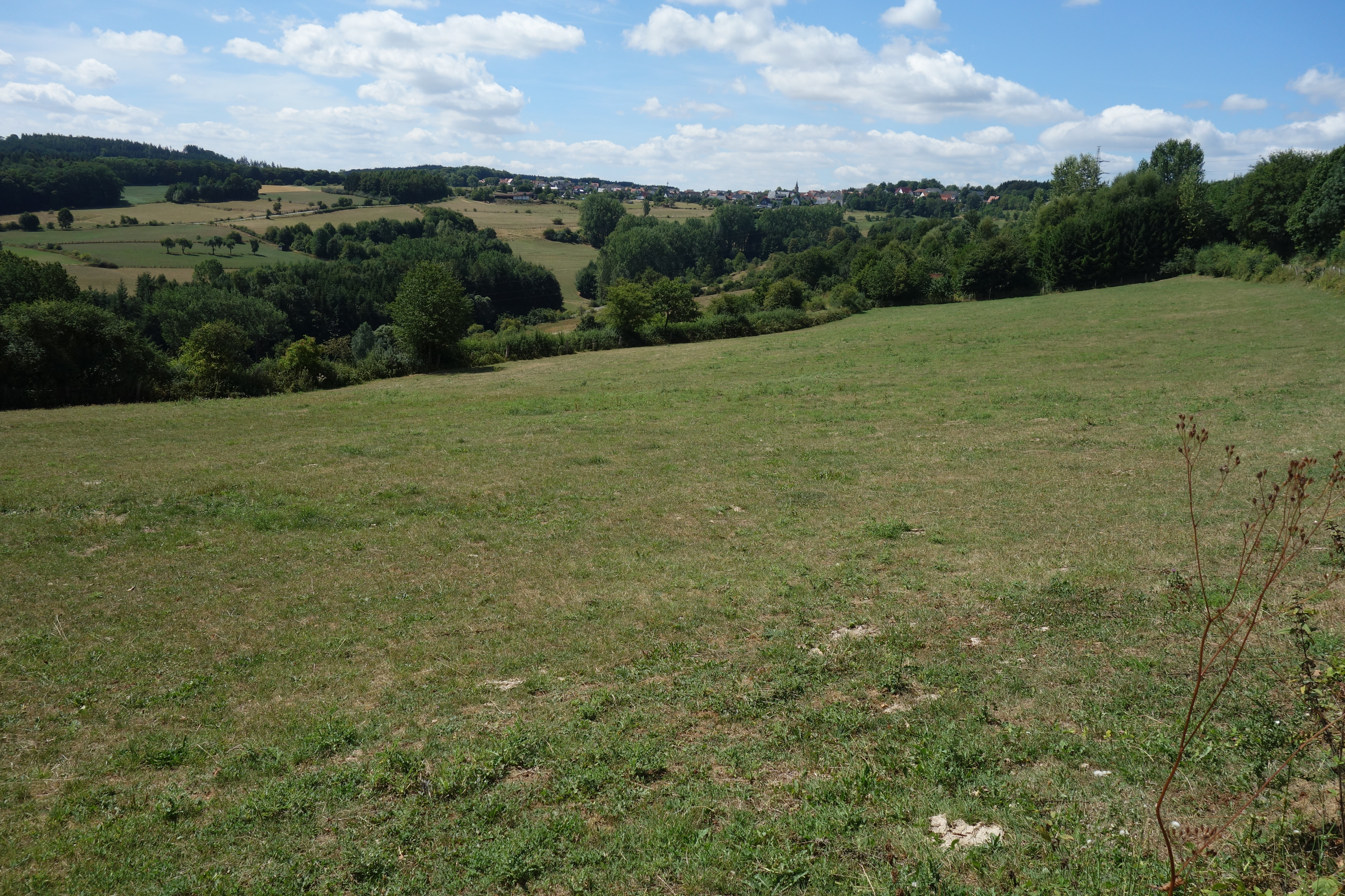 Naturschutzgebiet Niedernfeld im Stadtgebiet von Marsberg, HSK, NRW.